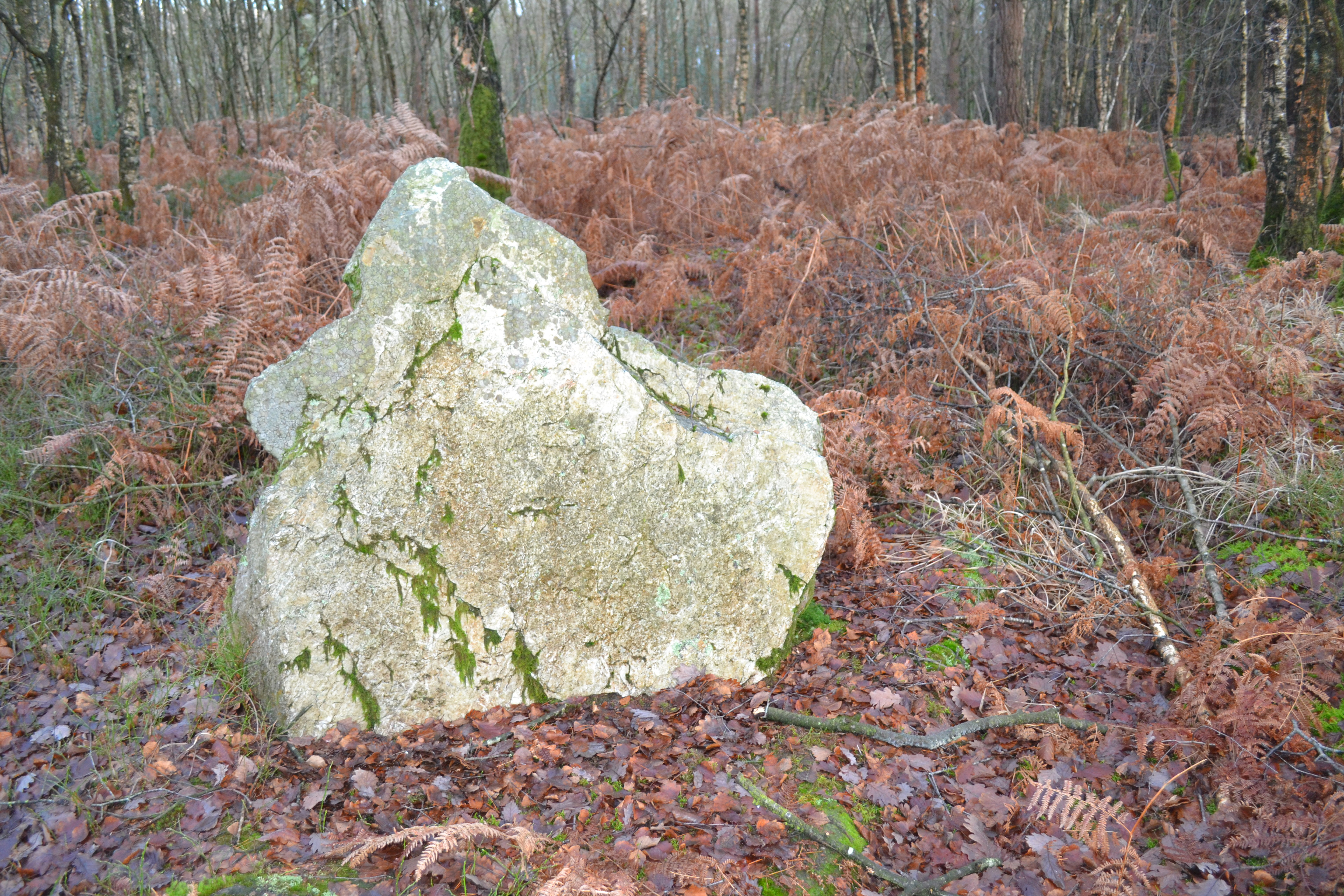 Menhir des Brosses, Liffré (35).